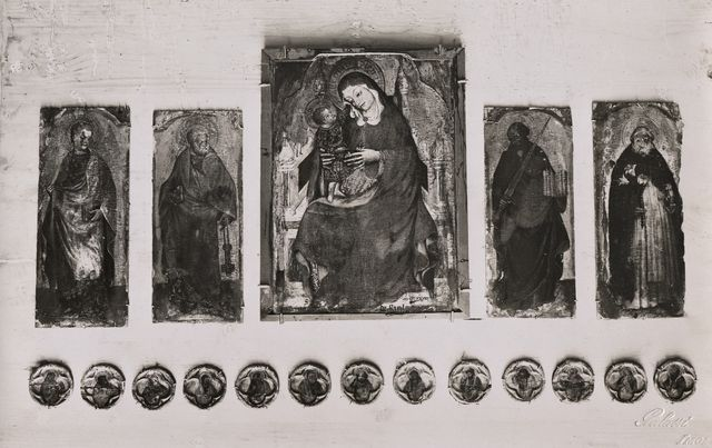 Giovanni da Riolo - Polittico Madonna Bambino e Santi Pinacoteca Civica Imola